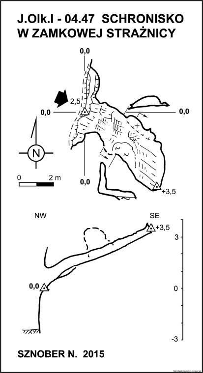 Schronisko w Zamkowej Strażnicy - plan